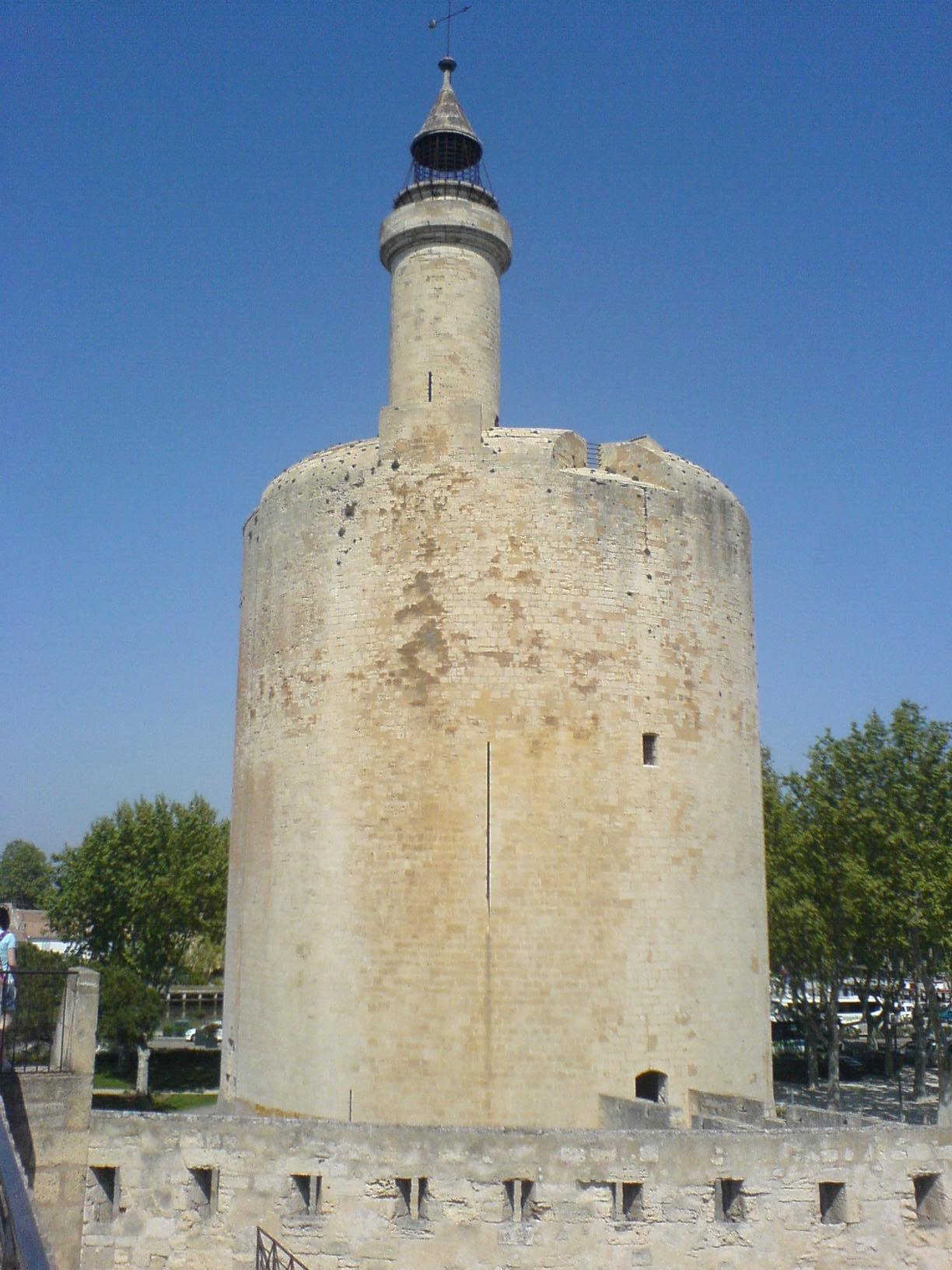 Torre de Constanza en la ciudad de Aigues-Mortes